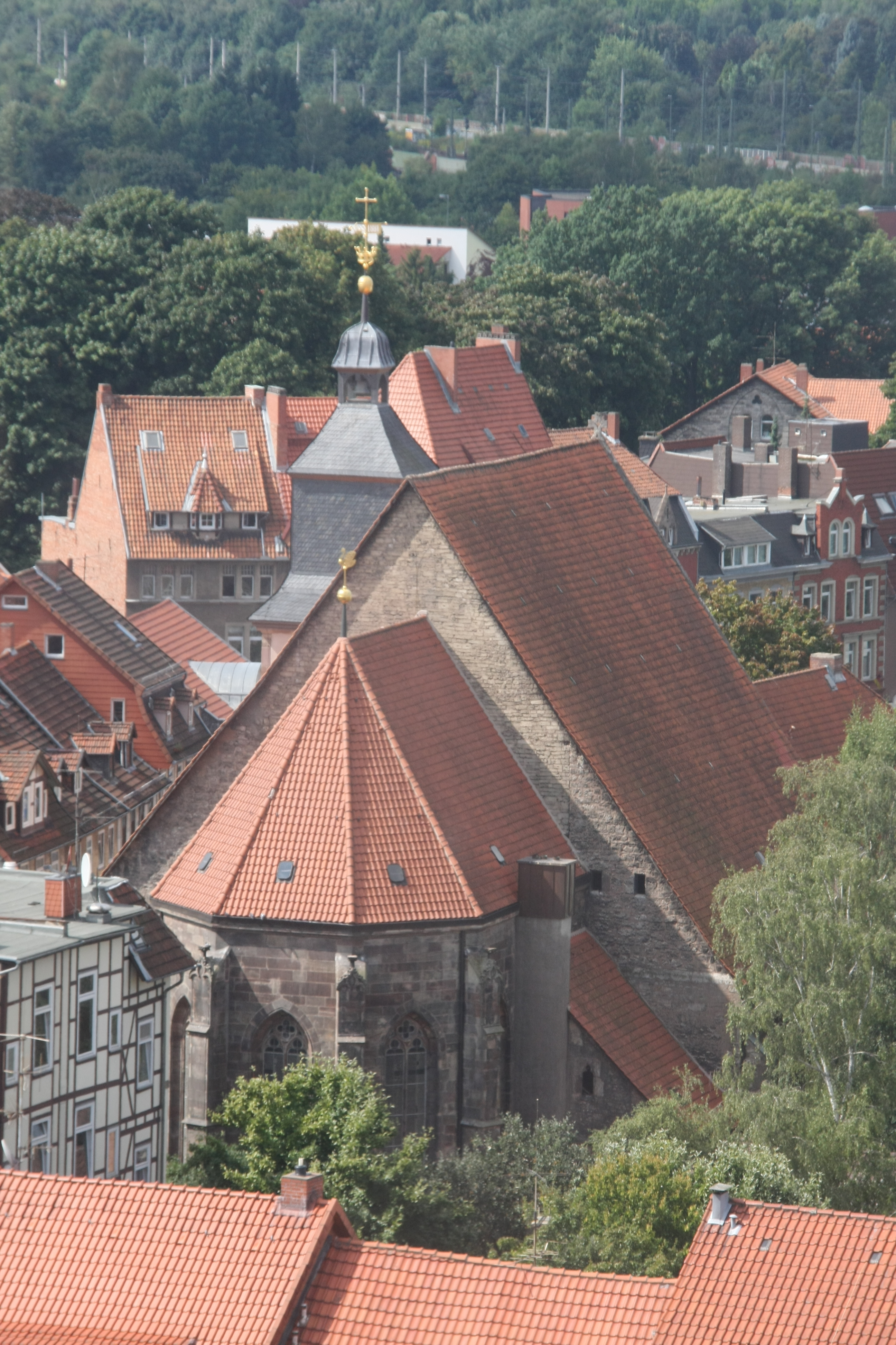 Blick auf die St.-Marien-Kirche, Göttingen, von der Johanniskirche aus.